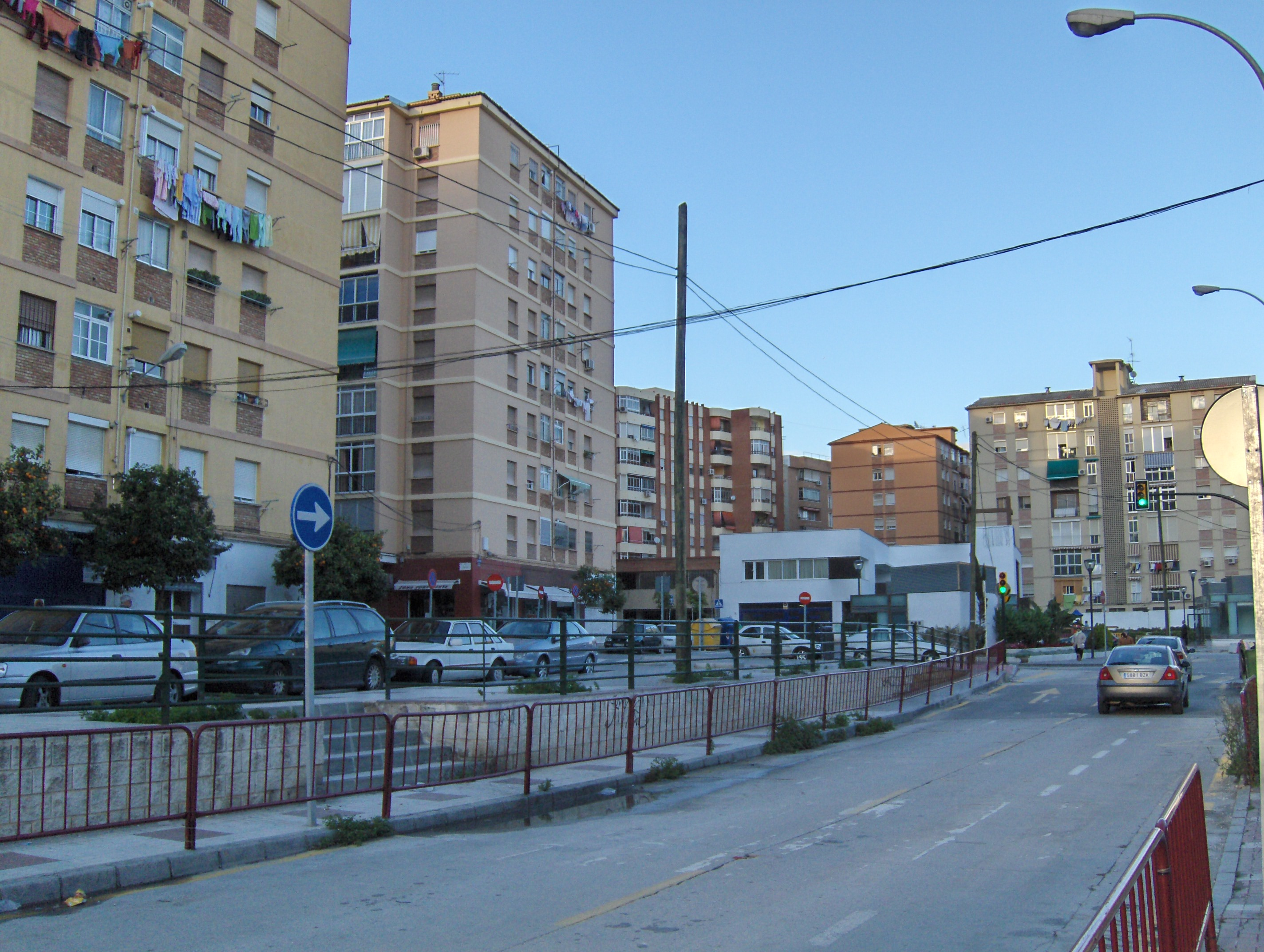 Barrio de La Unión, Málaga, España.